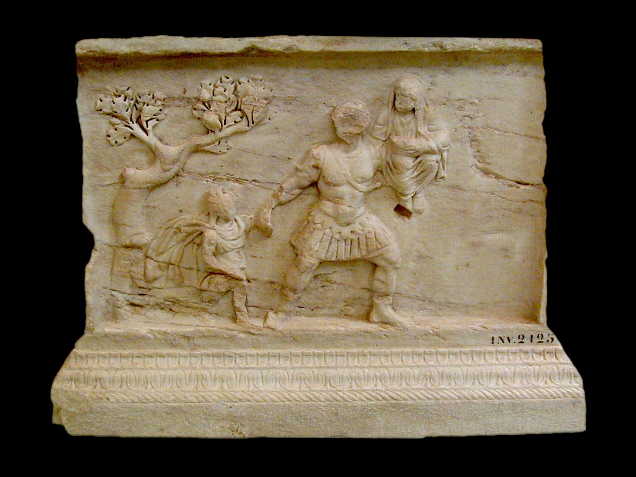 détail de l'autel de la gens augusta